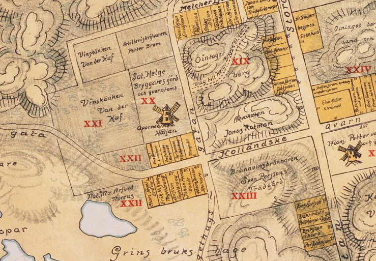 Kvarnen Häljan (eller Helgan) i en rekonstruktion av Holms tomtbok från 1674